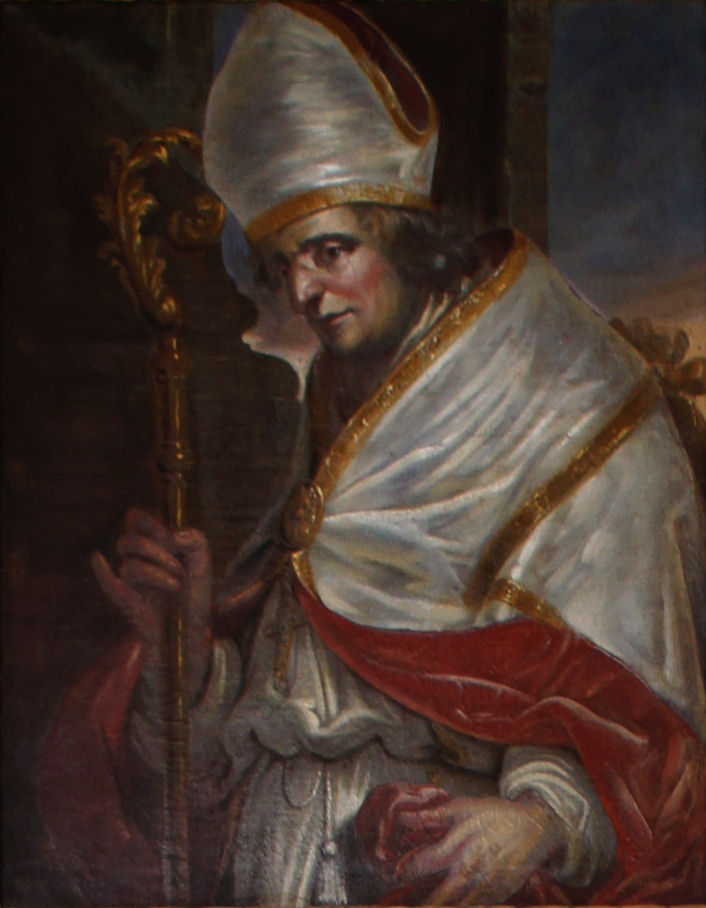 Porträtgemälde von Friedrich von Montalban, Bischof von Freising, im Fürstengang zwischen Fürstbischöflicher Residenz und Freisinger Dom.